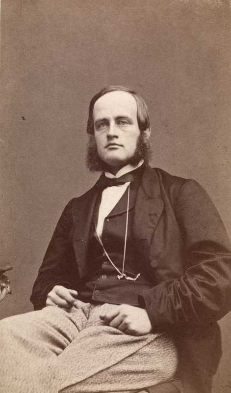 Portrett av Nils Anker, stortingsmann, portrett, mann, grosserer, sittende knefigur.